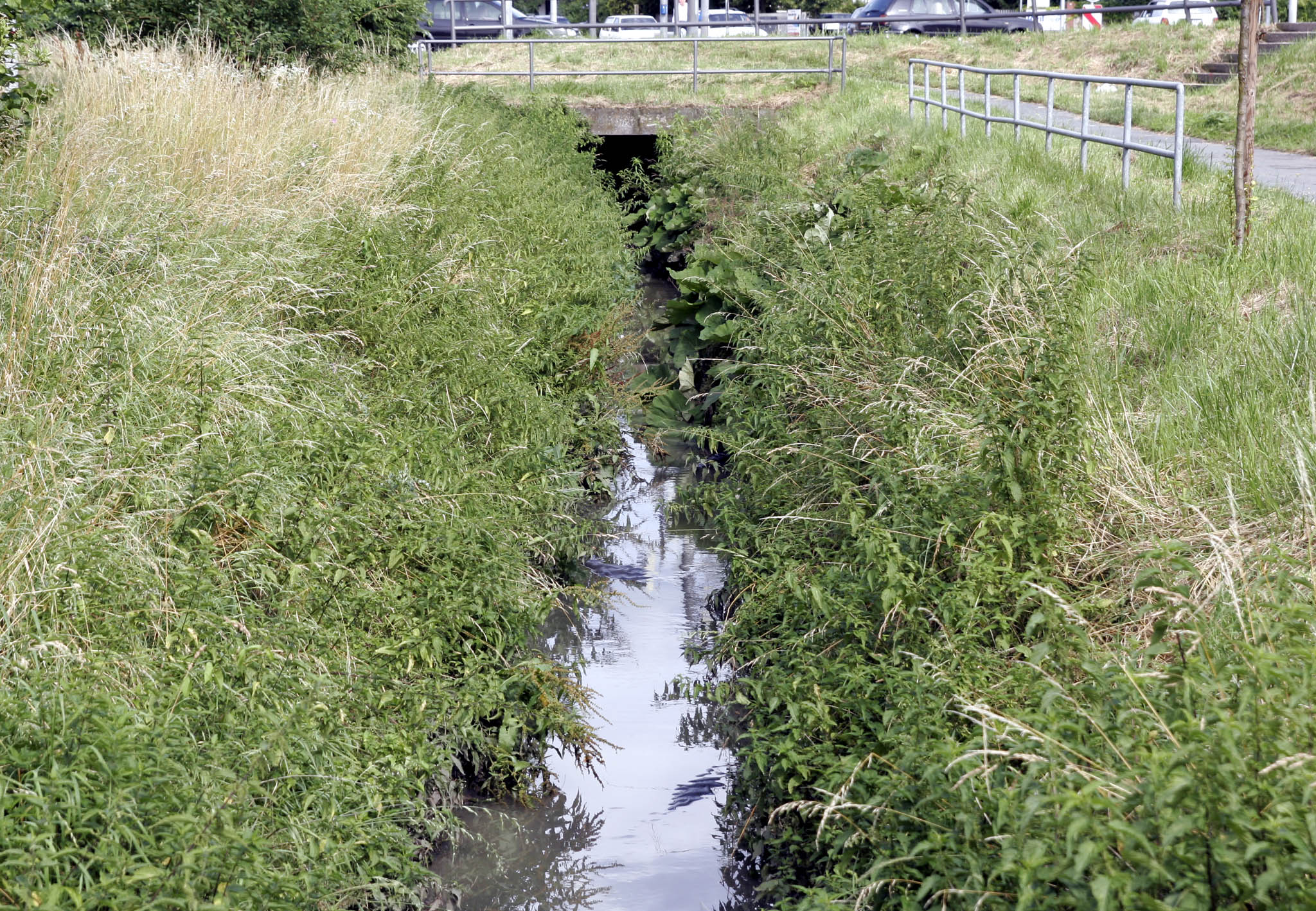 Der Neugraben, ein Abfluß der Lauter, der in die Weschnitz mündet (Südhessen)